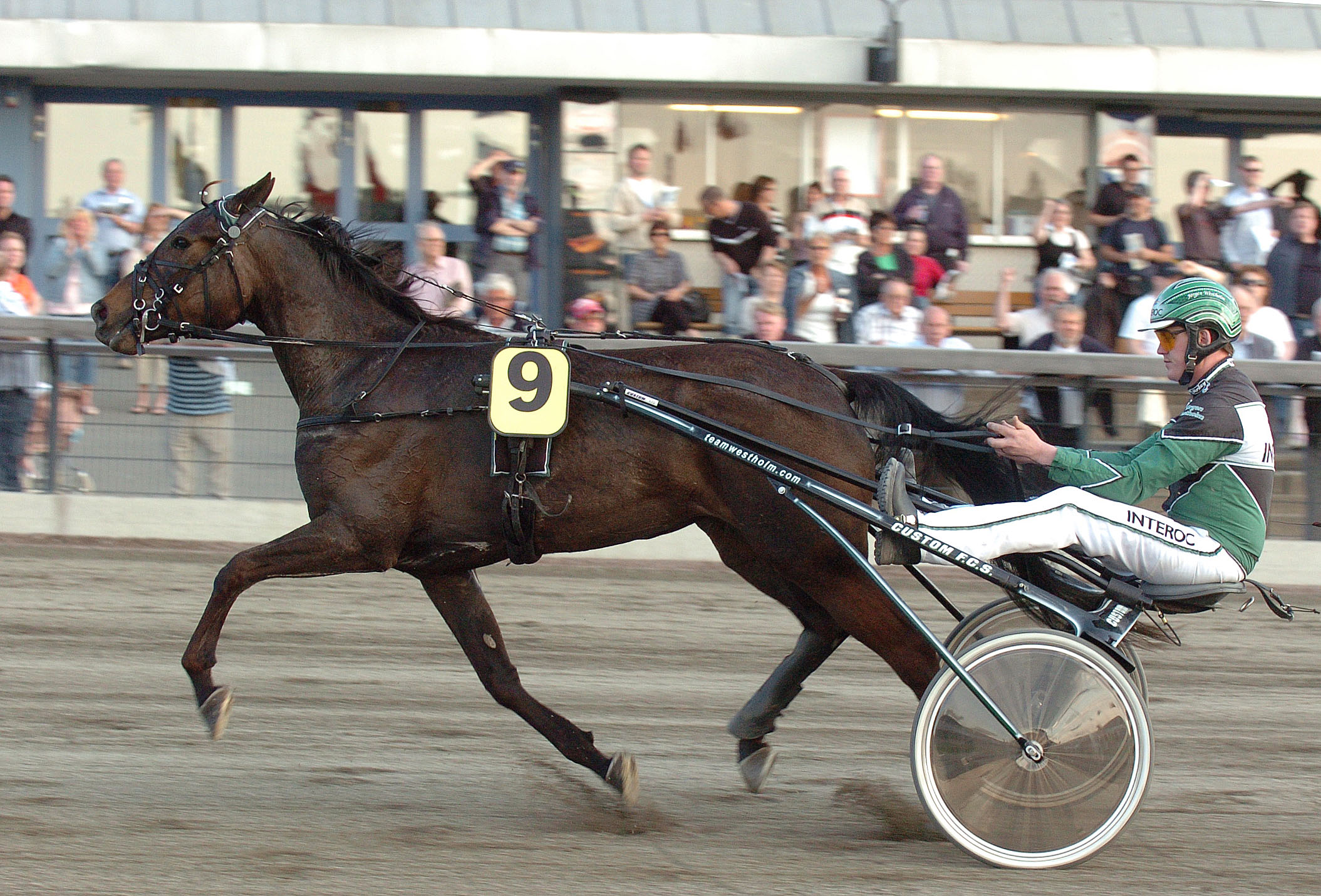 Kusken Jörgen Westholm och travaren Annicka på Åbytravet.